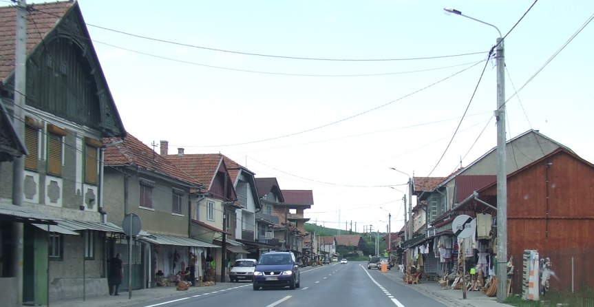 View from Izvoru Crişului, Cluj County, Romania